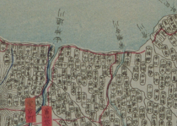 明治13年出版の「大日本分国輿地全図」（宮脇通赫作）より。国立公文書館蔵。